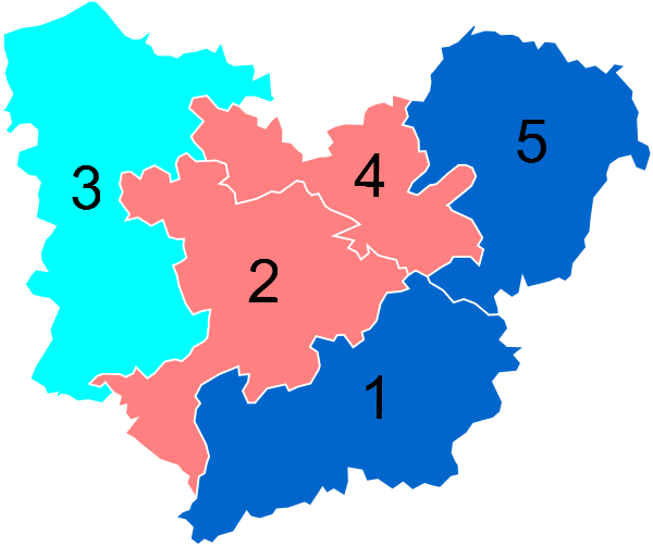 Résultats des élections législatives de l'Eure en 2012